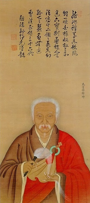 Thiền sư Trung Quốc